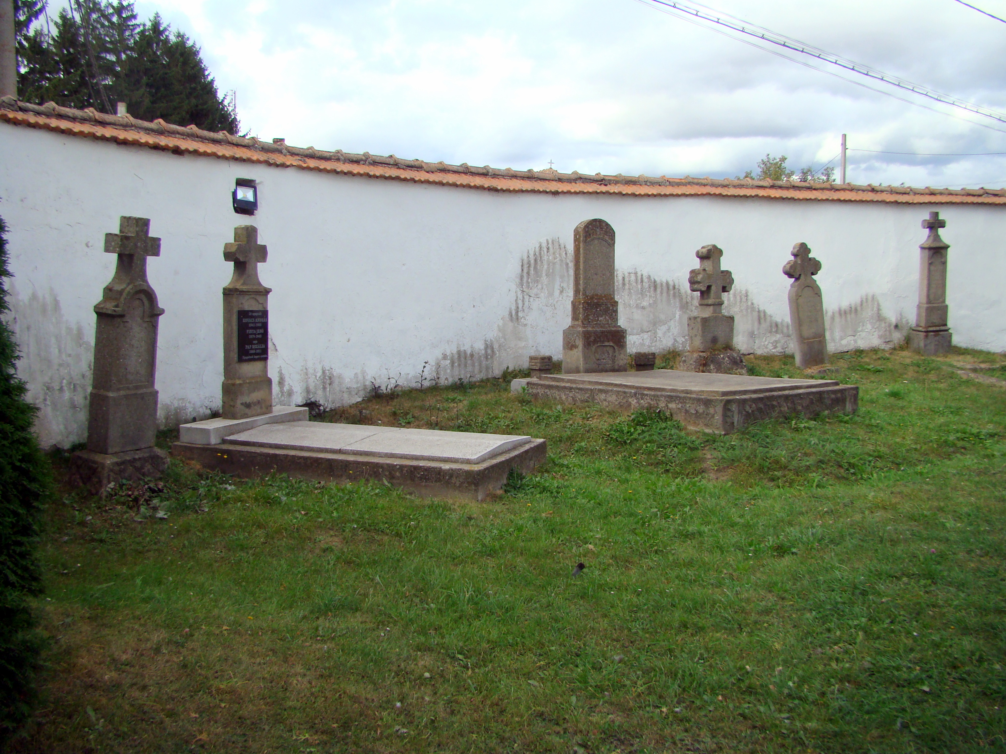 Zid de incintă, sat aparținător Lunga; municipiul Târgu Secuiesc Str. Principală 351 sec. XVII 02